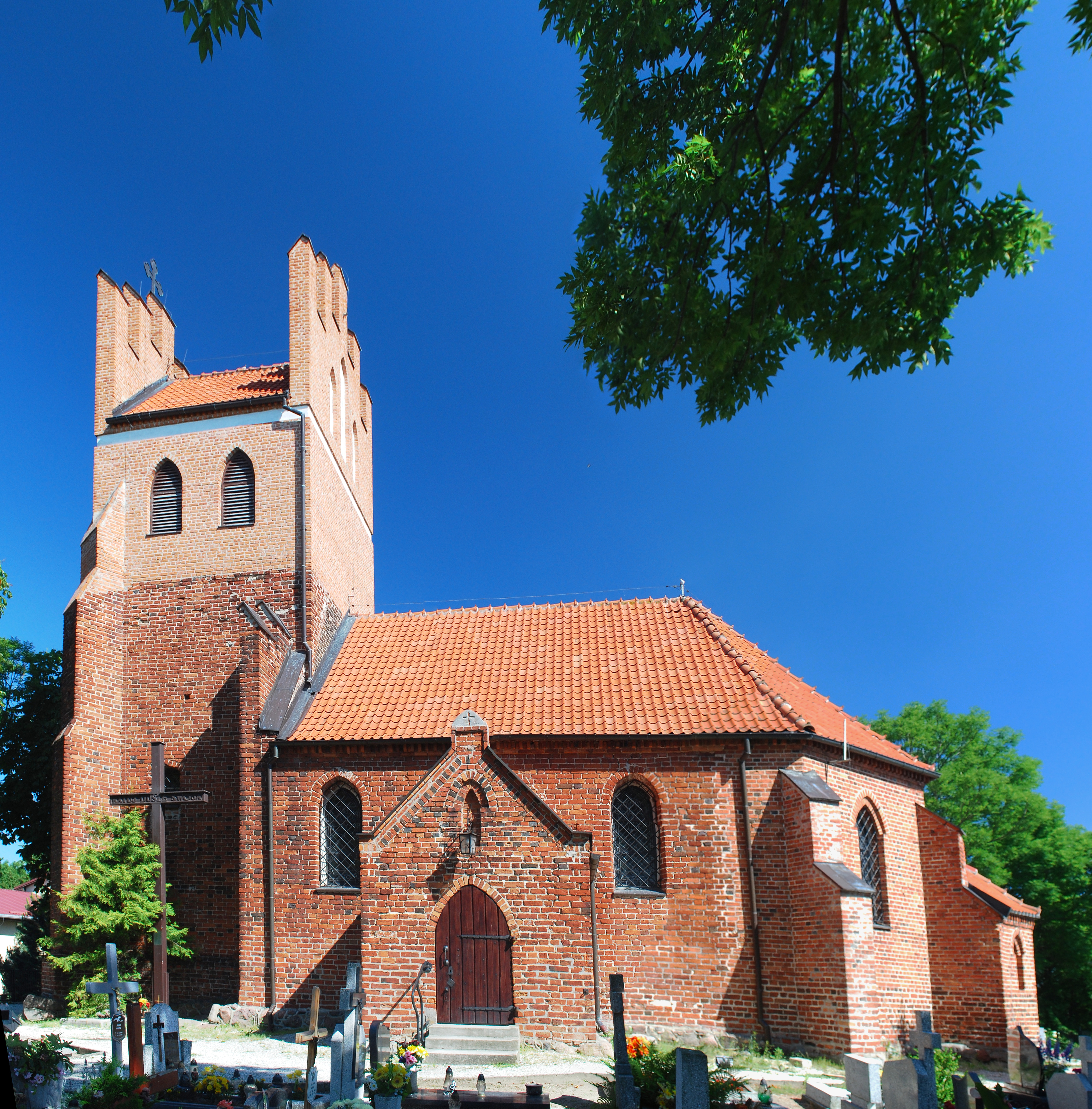 Kościół parafialny pw. św. Wojciecha z XIV we wsi Gorzędziej.